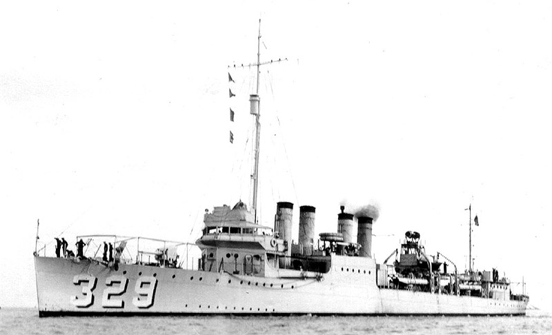 USS Bruce (DD-329)